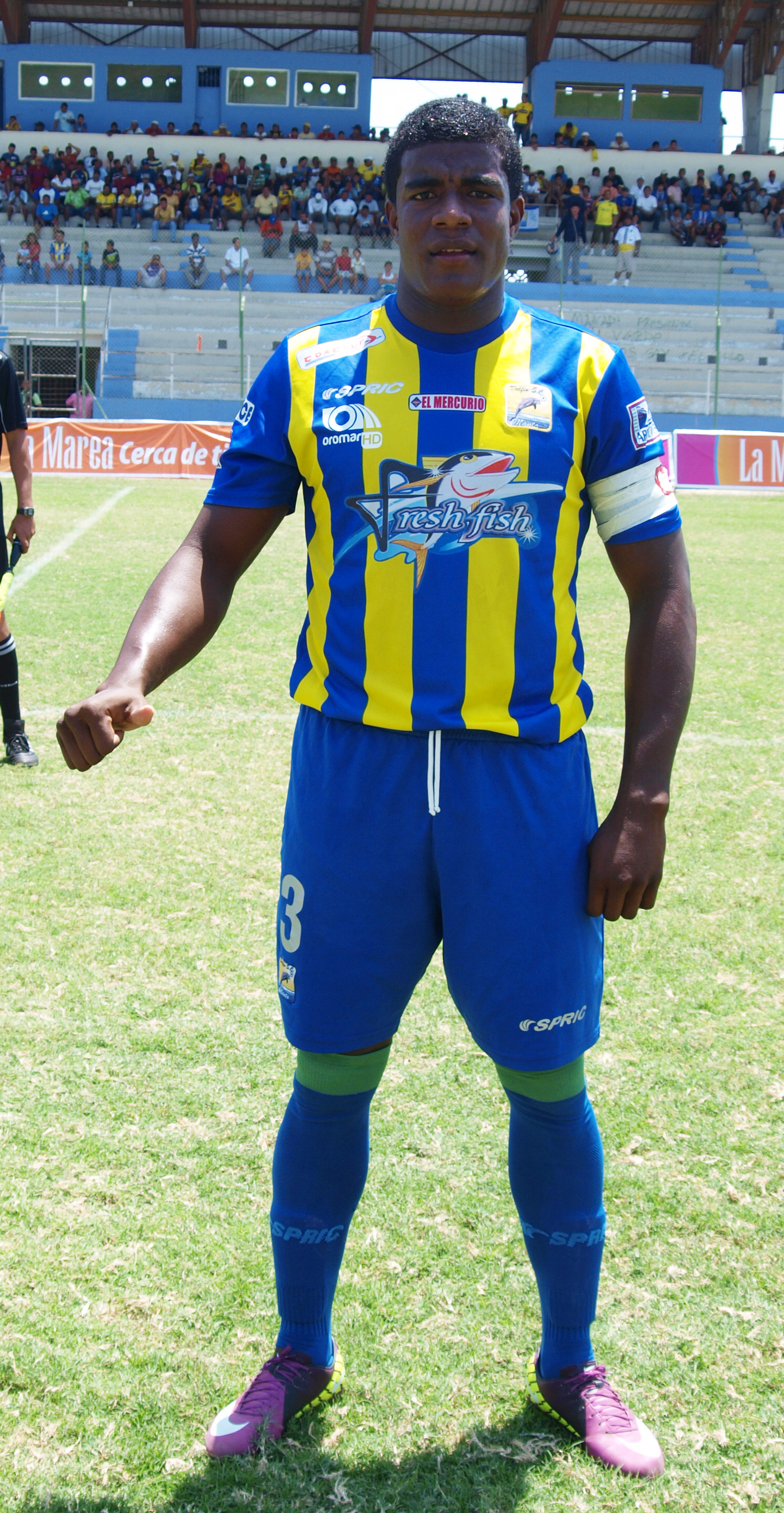 Freddy Castillo en Delfín Sporting Club de Manta 2012